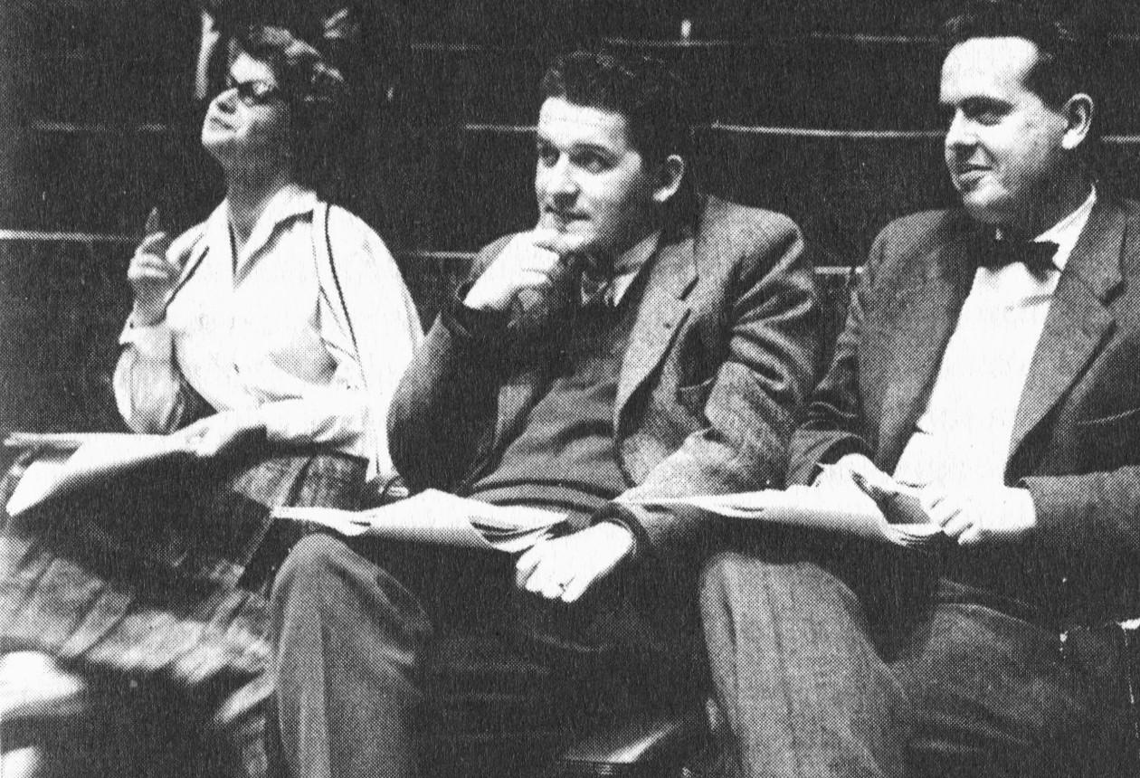 Mona Haskel, Hans Alfredson och Jörgen Cederberg i Sveriges Radios Karlaplansstudio